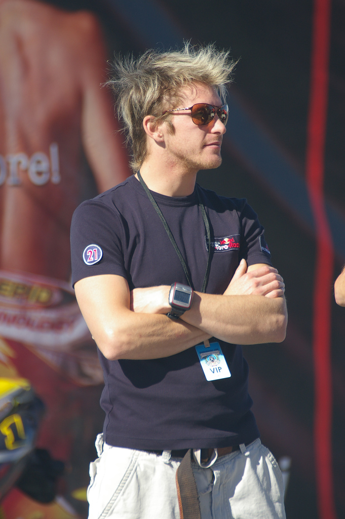 Formula One Toro Rosso Driver